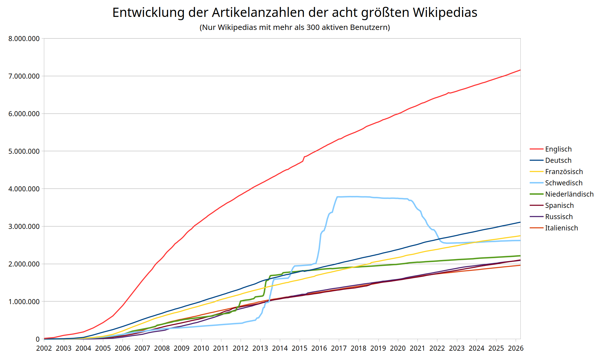 Diagramm über die Entwicklung der Artikelanzahlen der acht größten Wikipedias (Nur Wikipedias mit mehr als 200 aktiven Mitarbeitern)